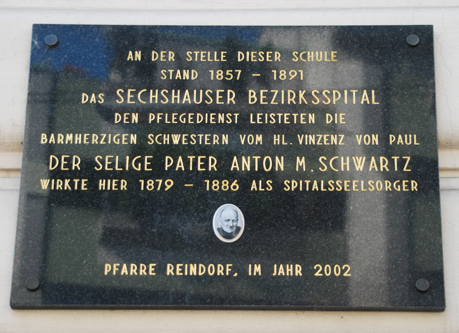 Gedenktafel für das Sechshauser Bezirksspital und Pater Anton M. Schwartz, der hier als Seelsorger tätig war, an einer Schule in der Sechshauser Straße 71 in Rudolfsheim-Fünfhaus in Wien